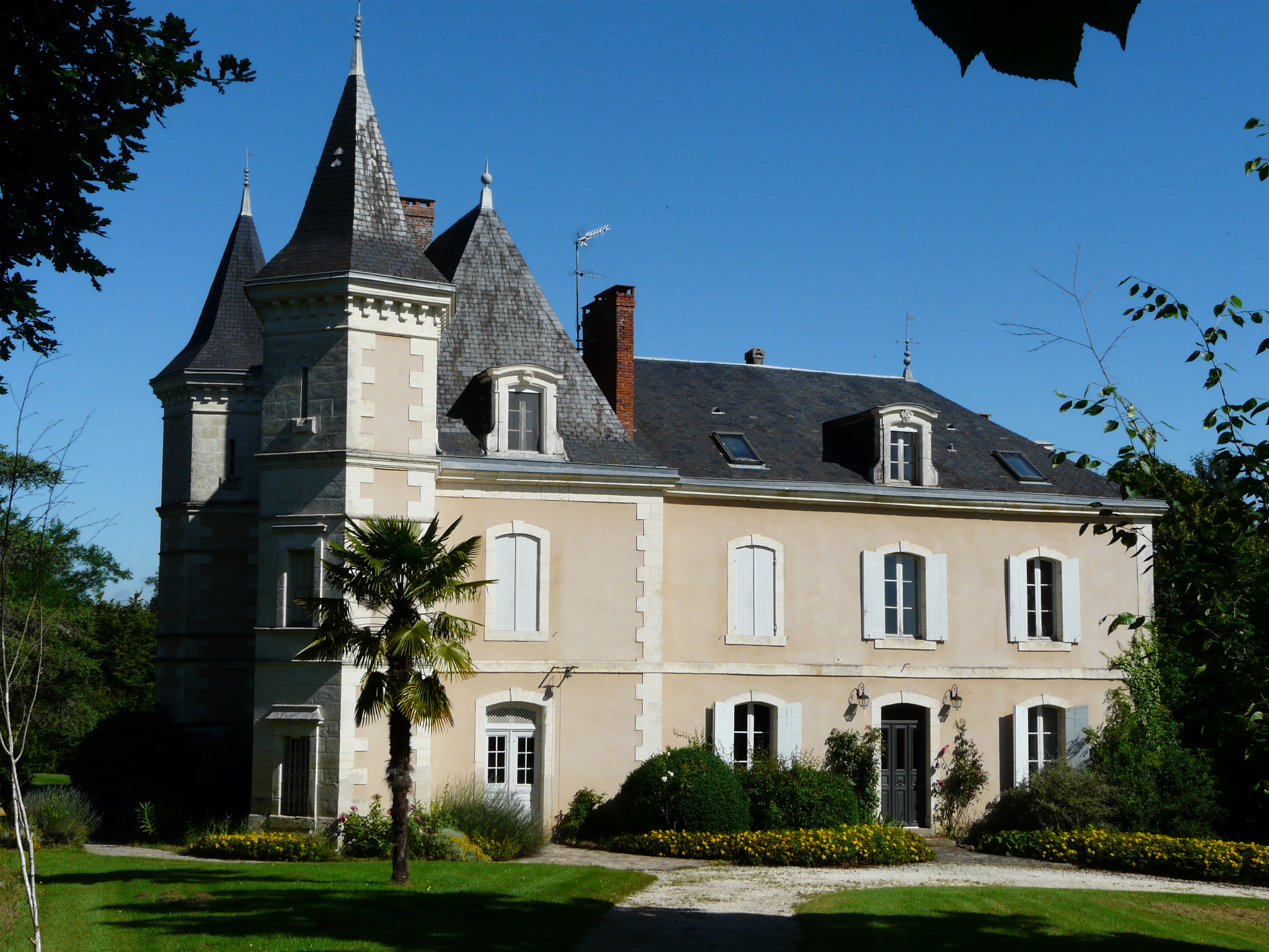 Le château de Monciaux, Bourrou, Dordogne, France.